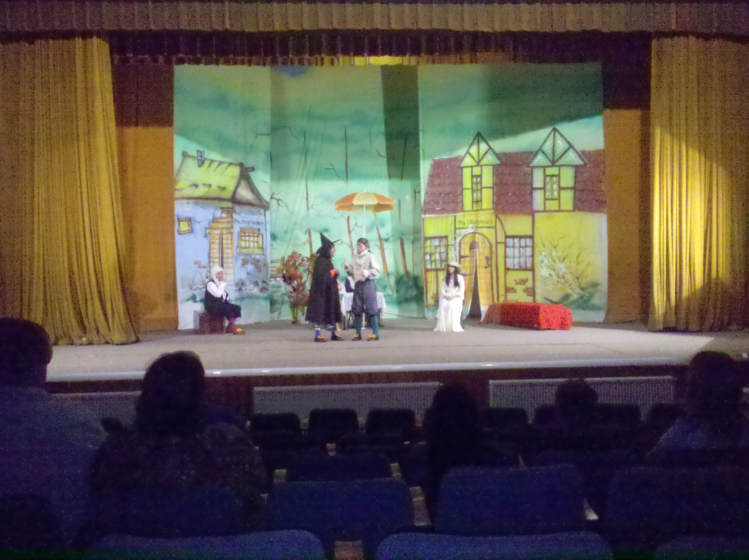 Secvenţă din piesa de teatru Doctor fără voie, pe scena Casei de Cultură din Roman Unknown